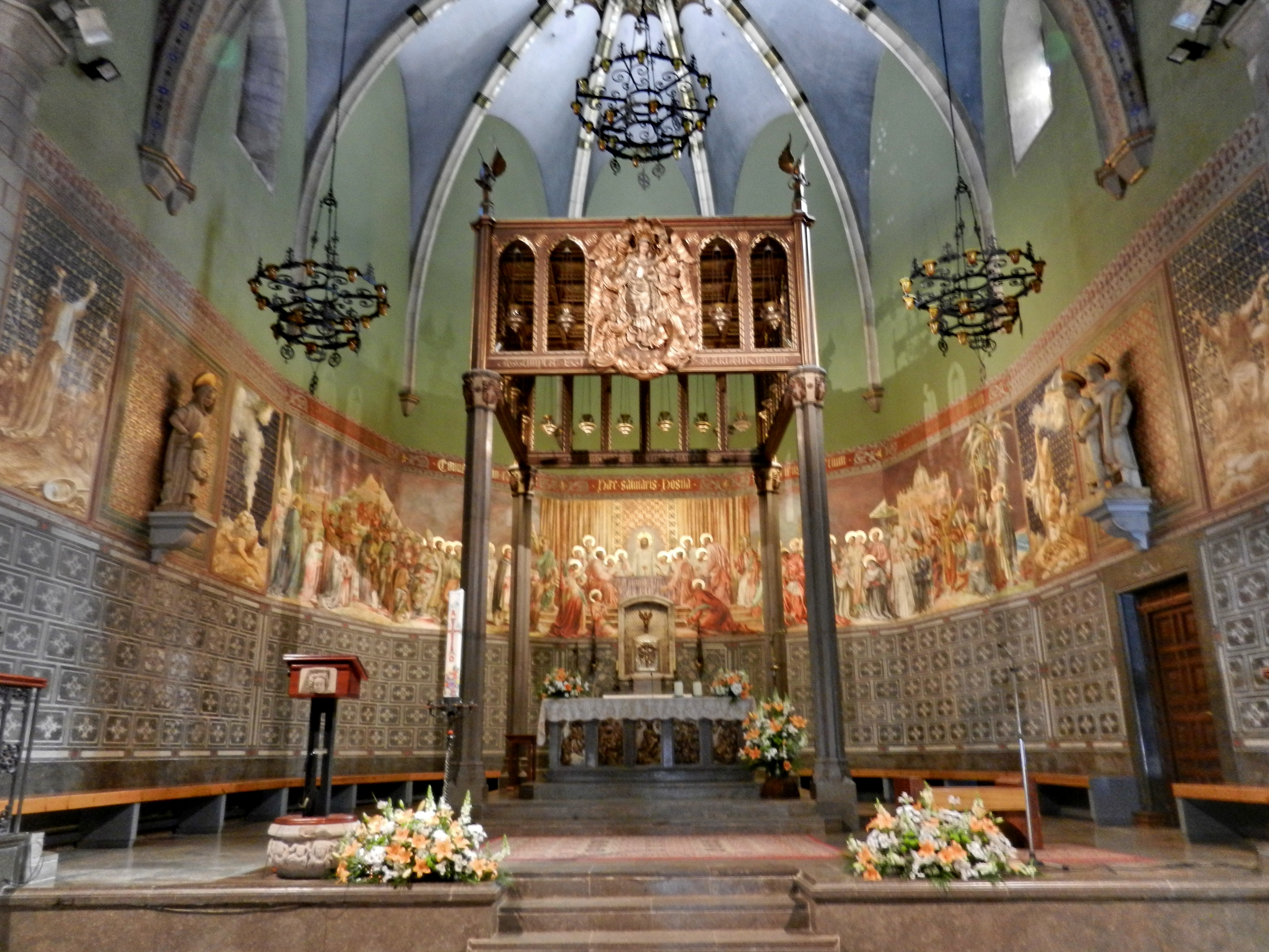 Blanes